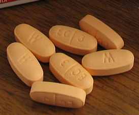 Vitamin tablets